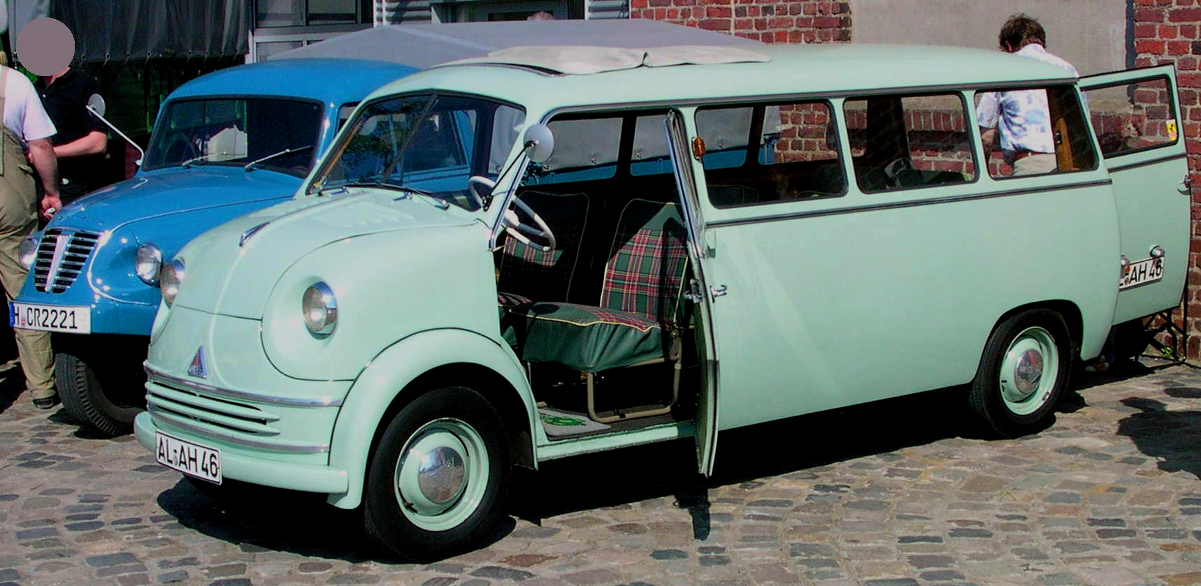 Willich, Borgward-Treffen im LKW-Museum, Lloyd-Kleinbus